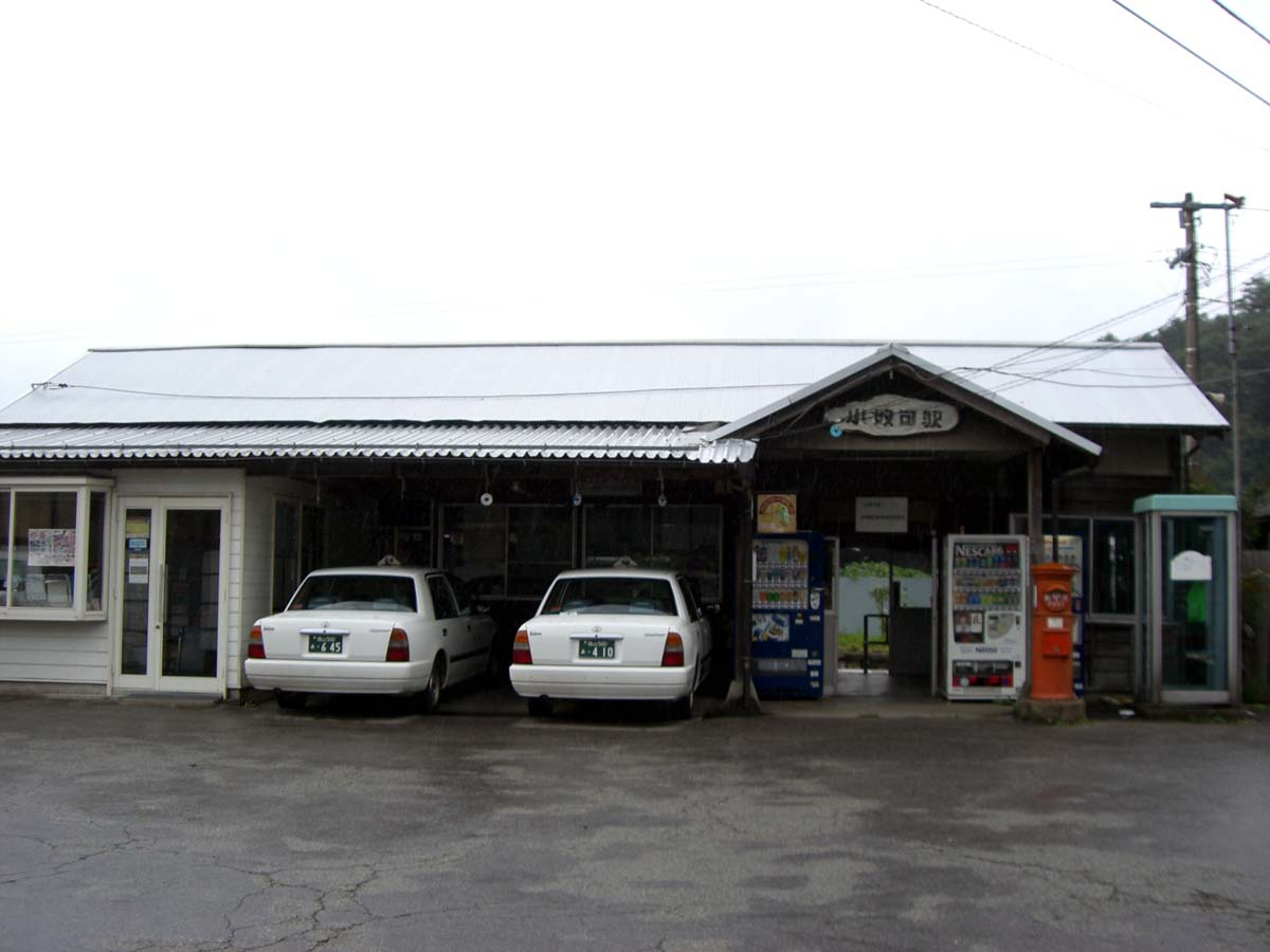 撮影地、撮影場所…JR芸備線、小奴可駅の駅舎。撮影年月日…2006年9月17日